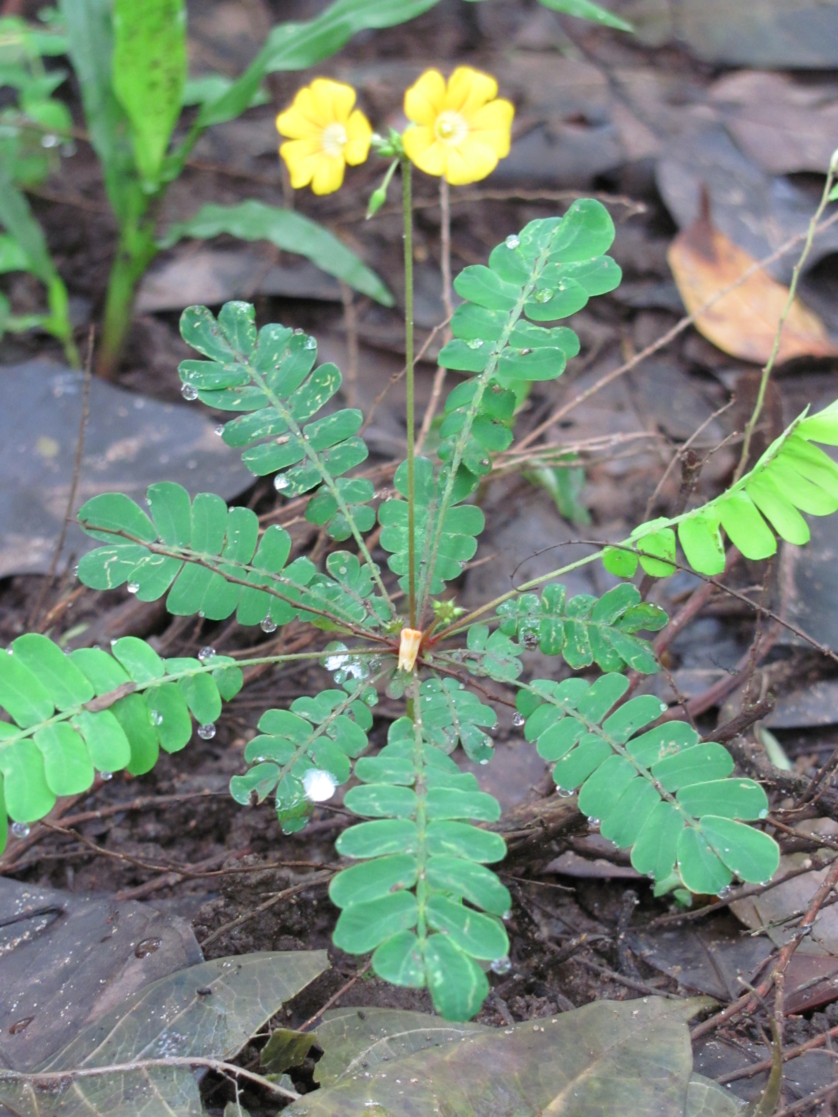 മുക്കുറ്റിച്ചെടി ഒരു ഔഷധസസ്യം കൂടിയാണ്